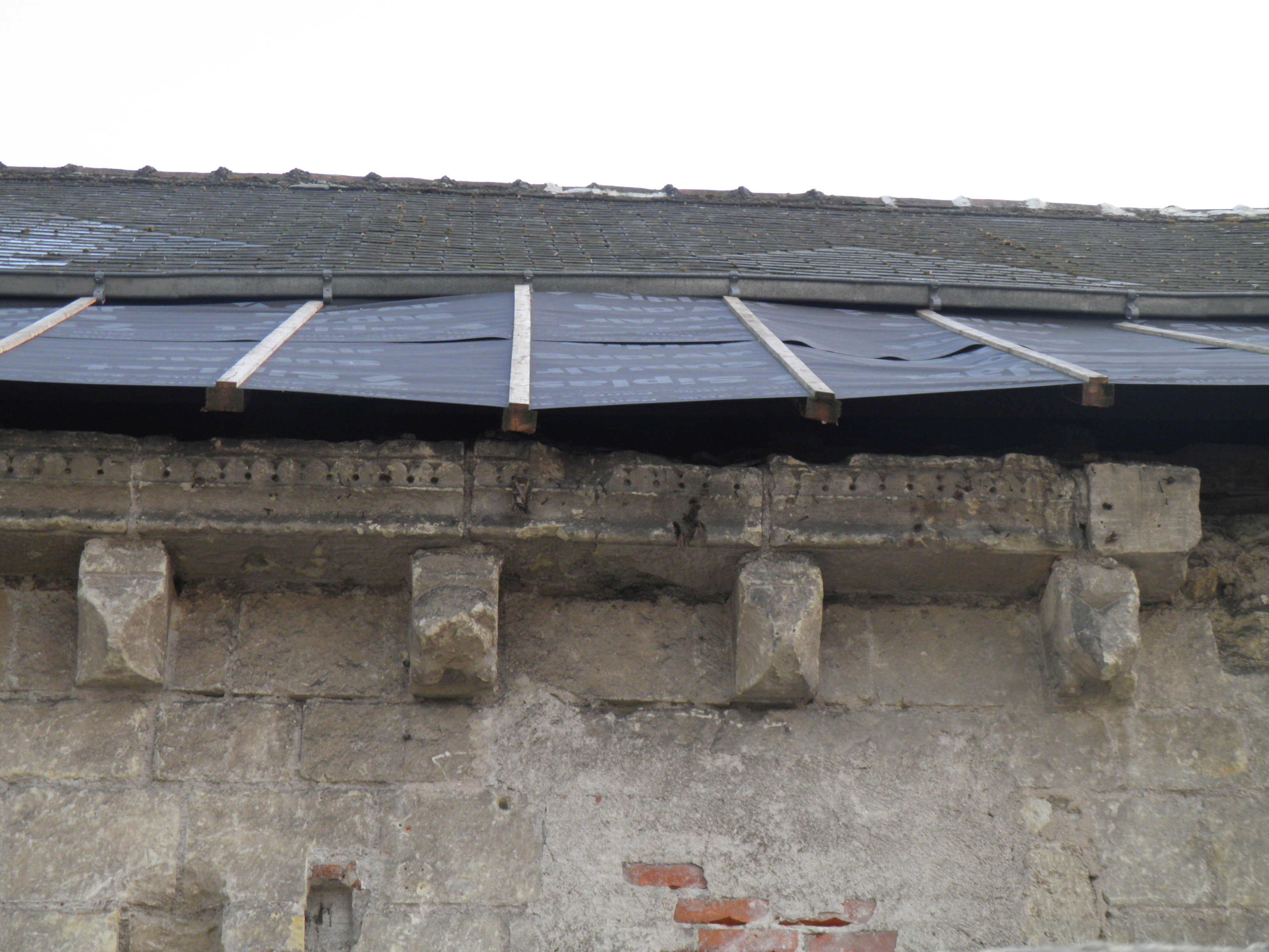 Chapelle Saint Libert Tours This building is indexed in the Base Mérimée, a database of architectural heritage maintained by the French Ministry of Culture, under the references PA00098154 and IA00071229 .